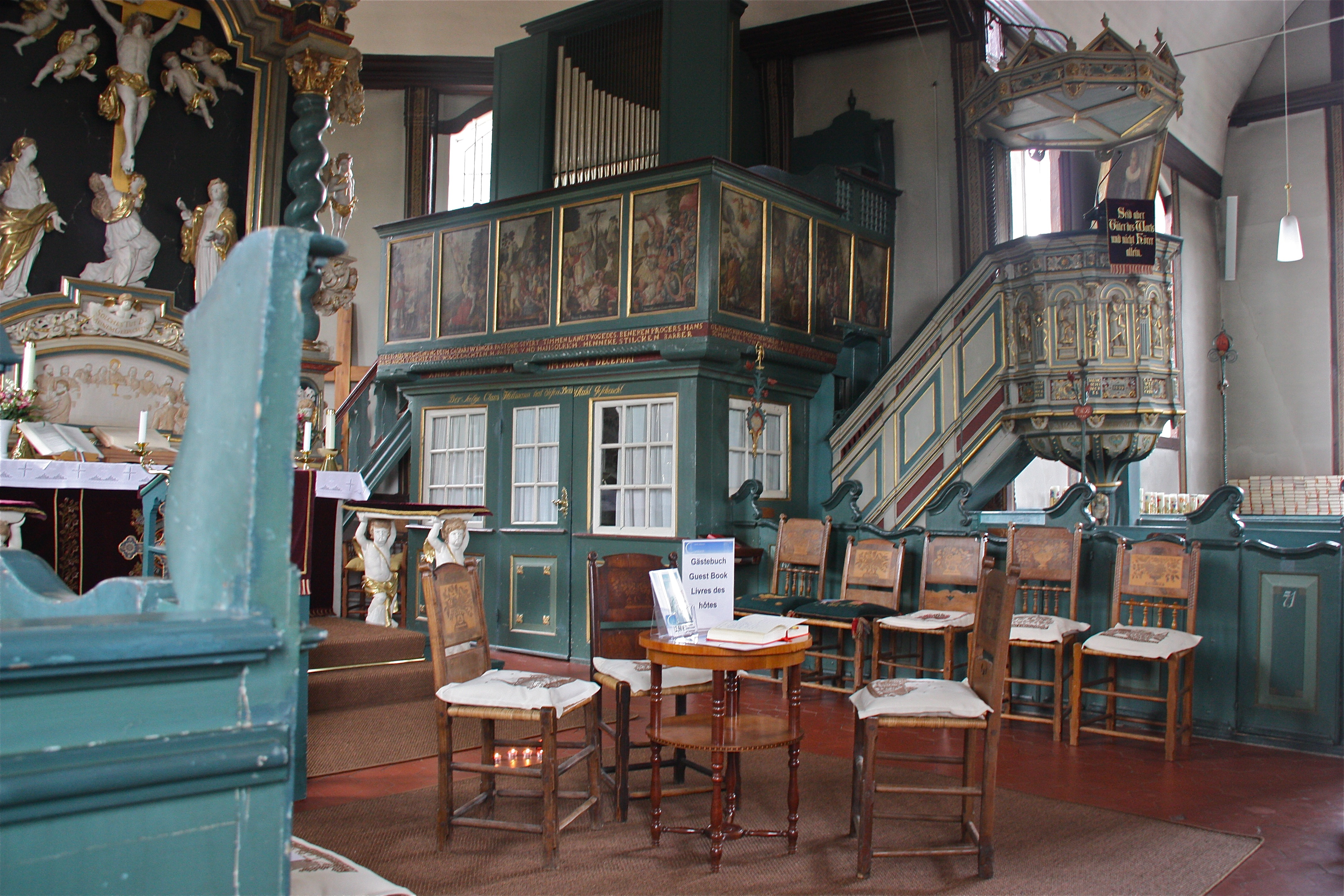 Hamburg, Curslack, St. Johannis-Kirche, Alter Orgelboden, Kleine Orgel (Beckerath 1971, Scherer-Pfeifen von 1622), KanzelThis is a photograph of an architectural monument.